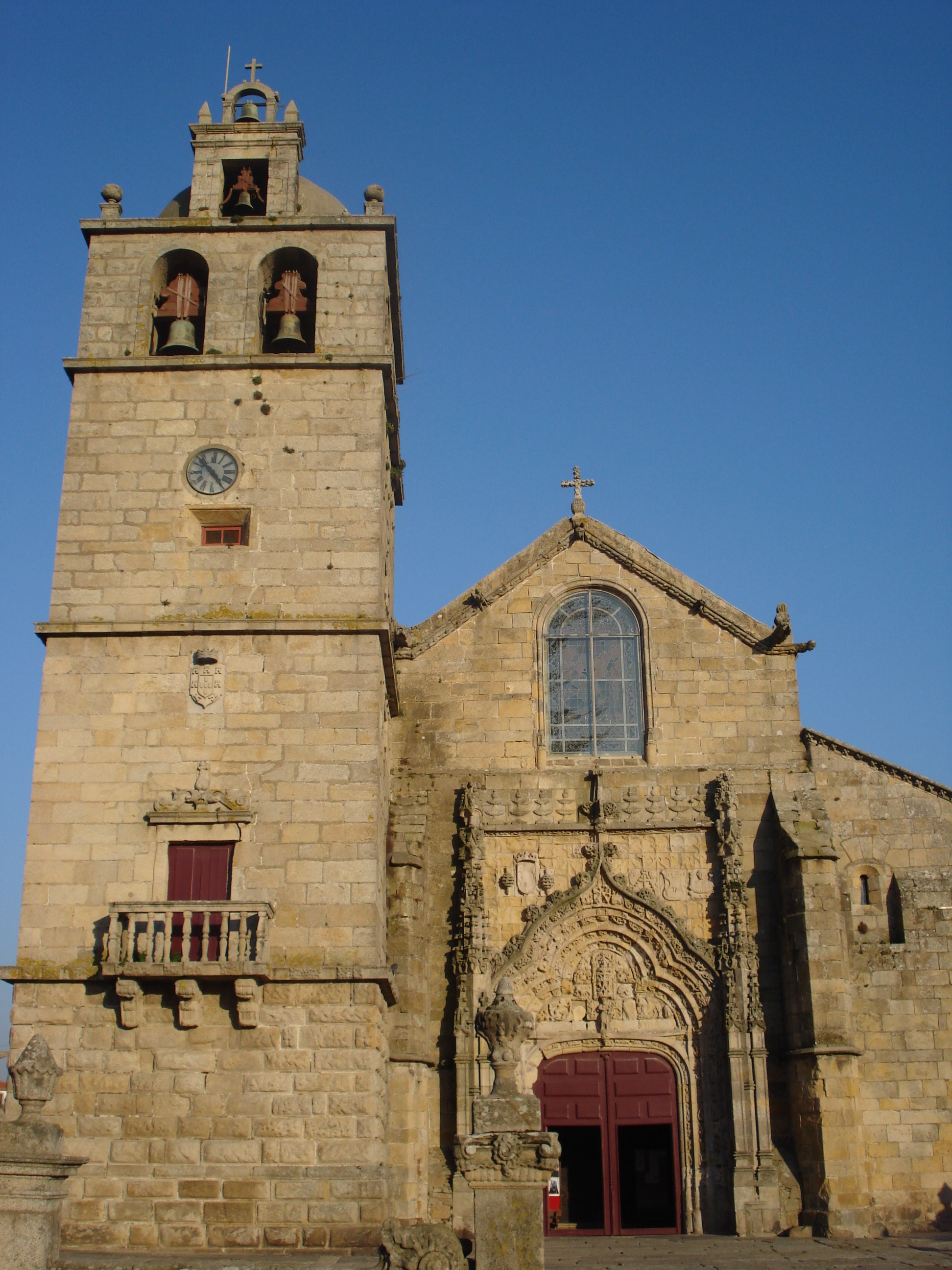 Fachada da Igreja Matriz de Vila do Conde